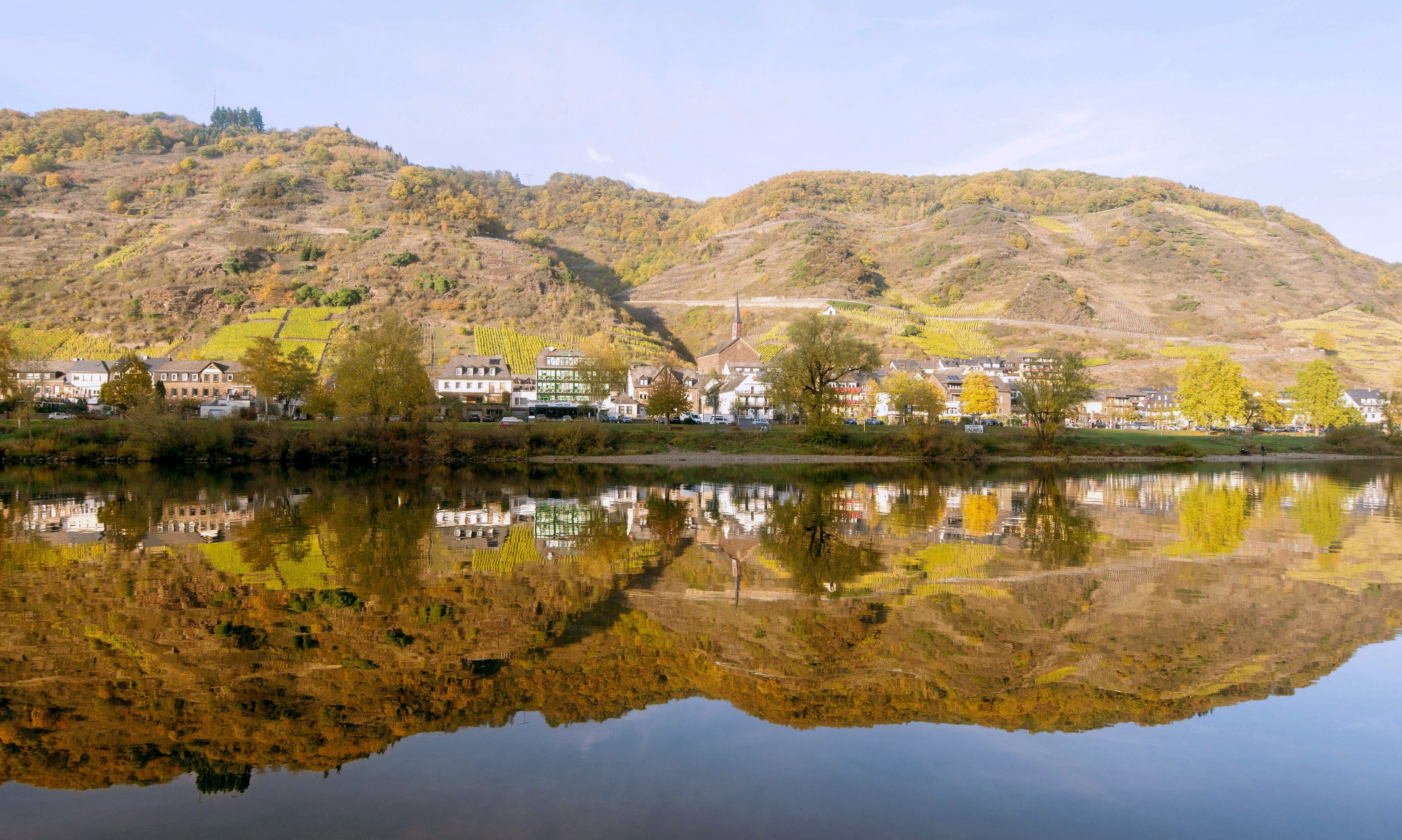 Valwig von der anderen Moselseite